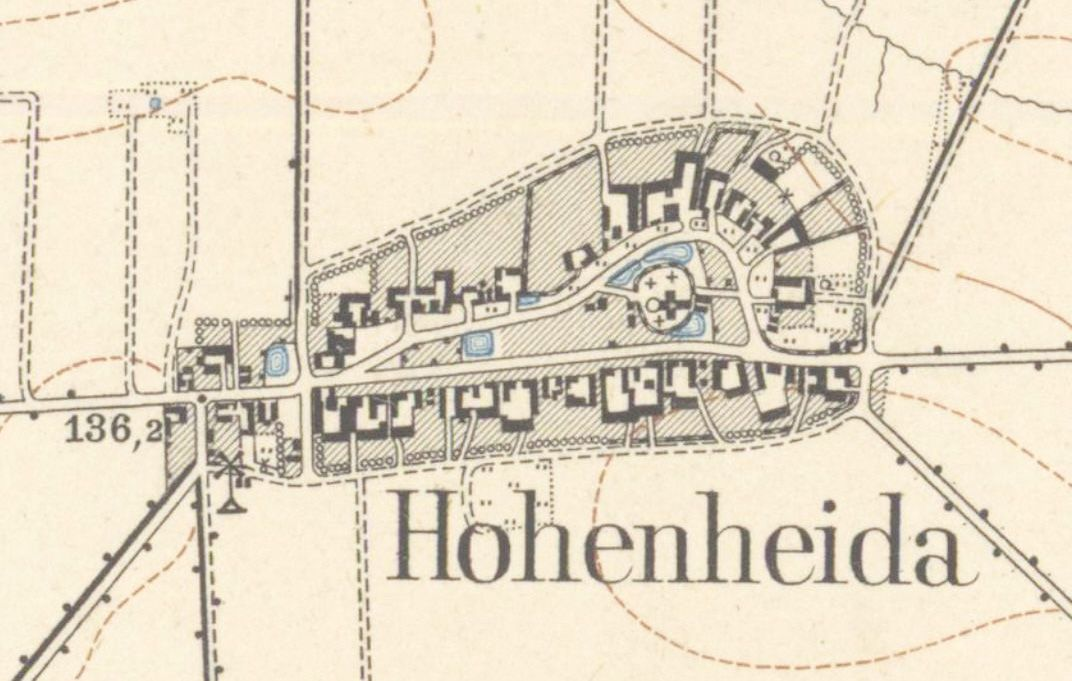 Hohenheida auf einem Messtischblatt von 1907